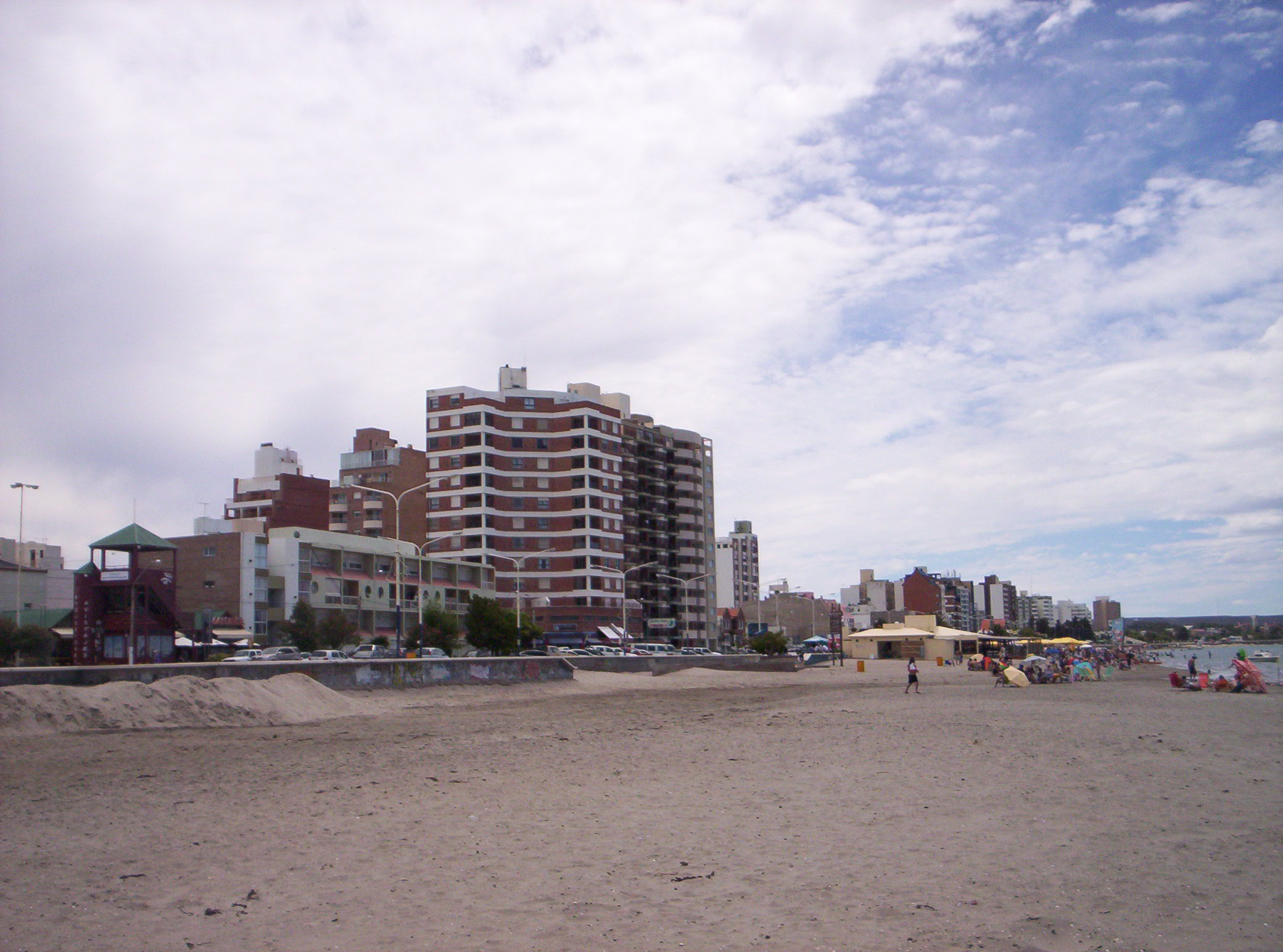 vista de parte del centro